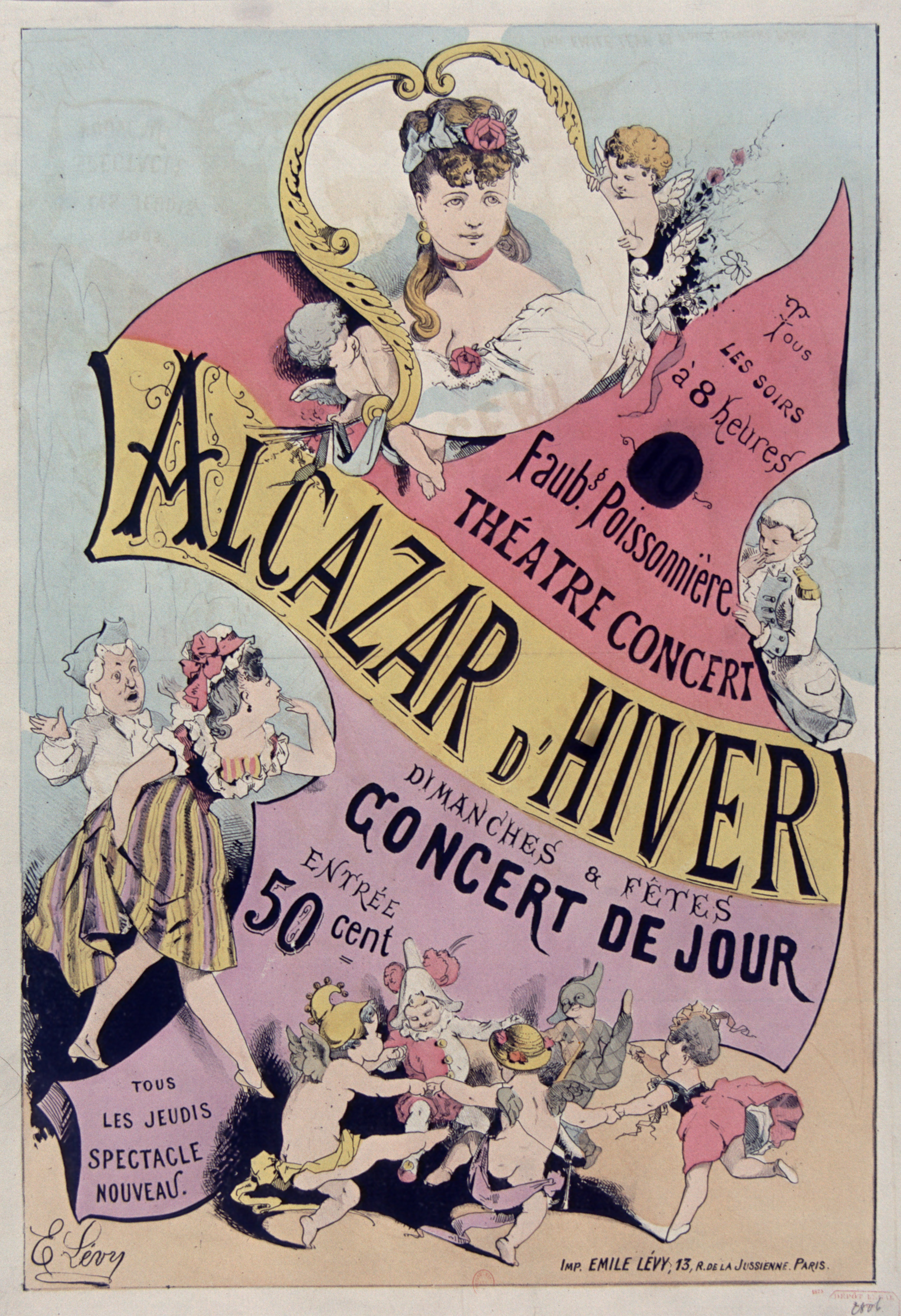 Tous les soirs à 8 heures Faubg. Poissonnière. Théâtre-Concert Alcazar d'Hiver. (affiche)